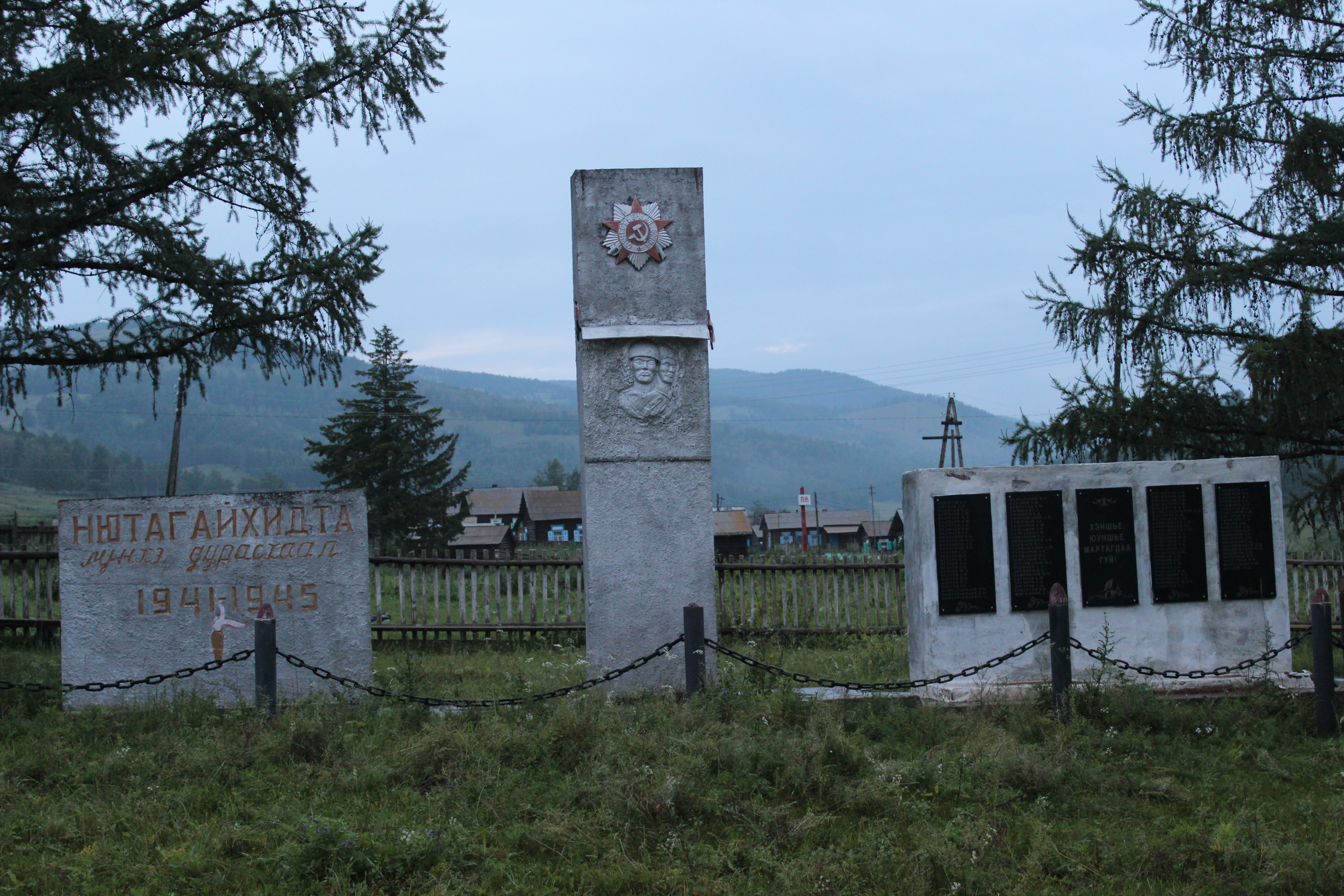 Памятник ветеранам Великой Отечественной войны в селе Алцак, Джидинский район, Бурятия